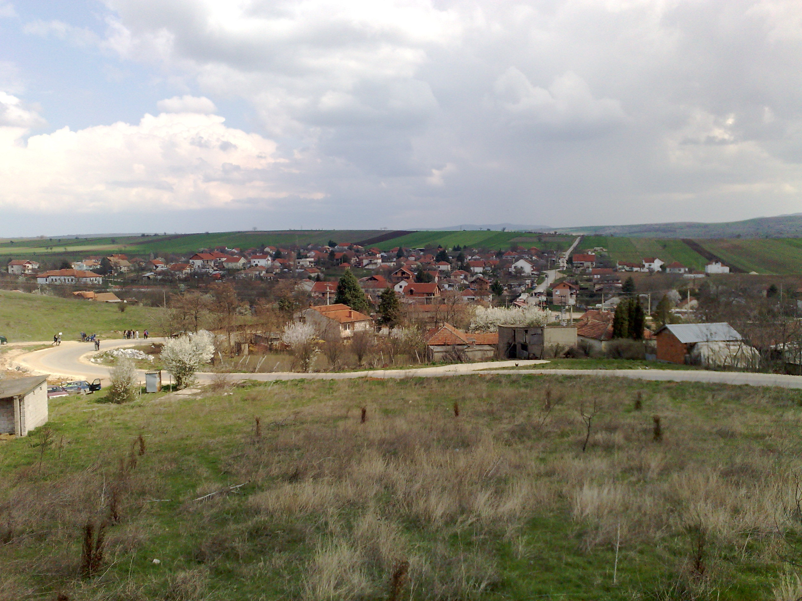 Поглед на селото Мршевци од селската црква.